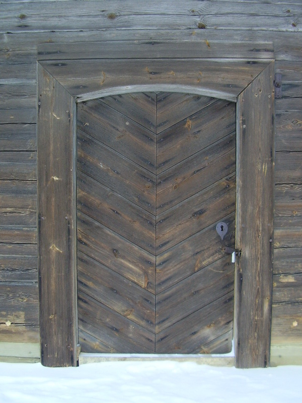 Дзверы касцёла Святога Роха ў вёсцы Шабуні Пухавіцкага раёна